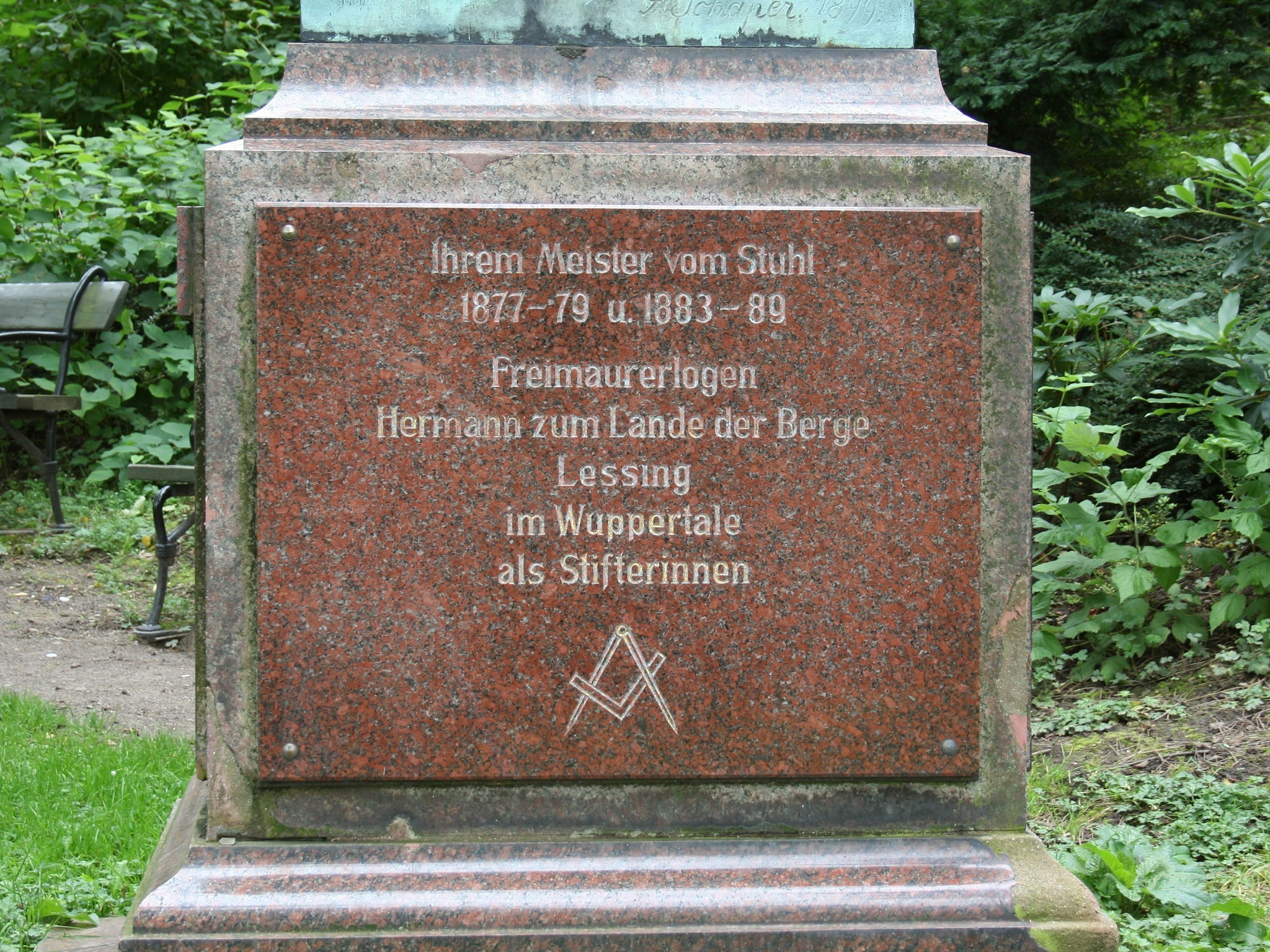 Friedrich Emil Rittershaus-Denkmal in den Barmer Anlagen in Wuppertal-Barmen